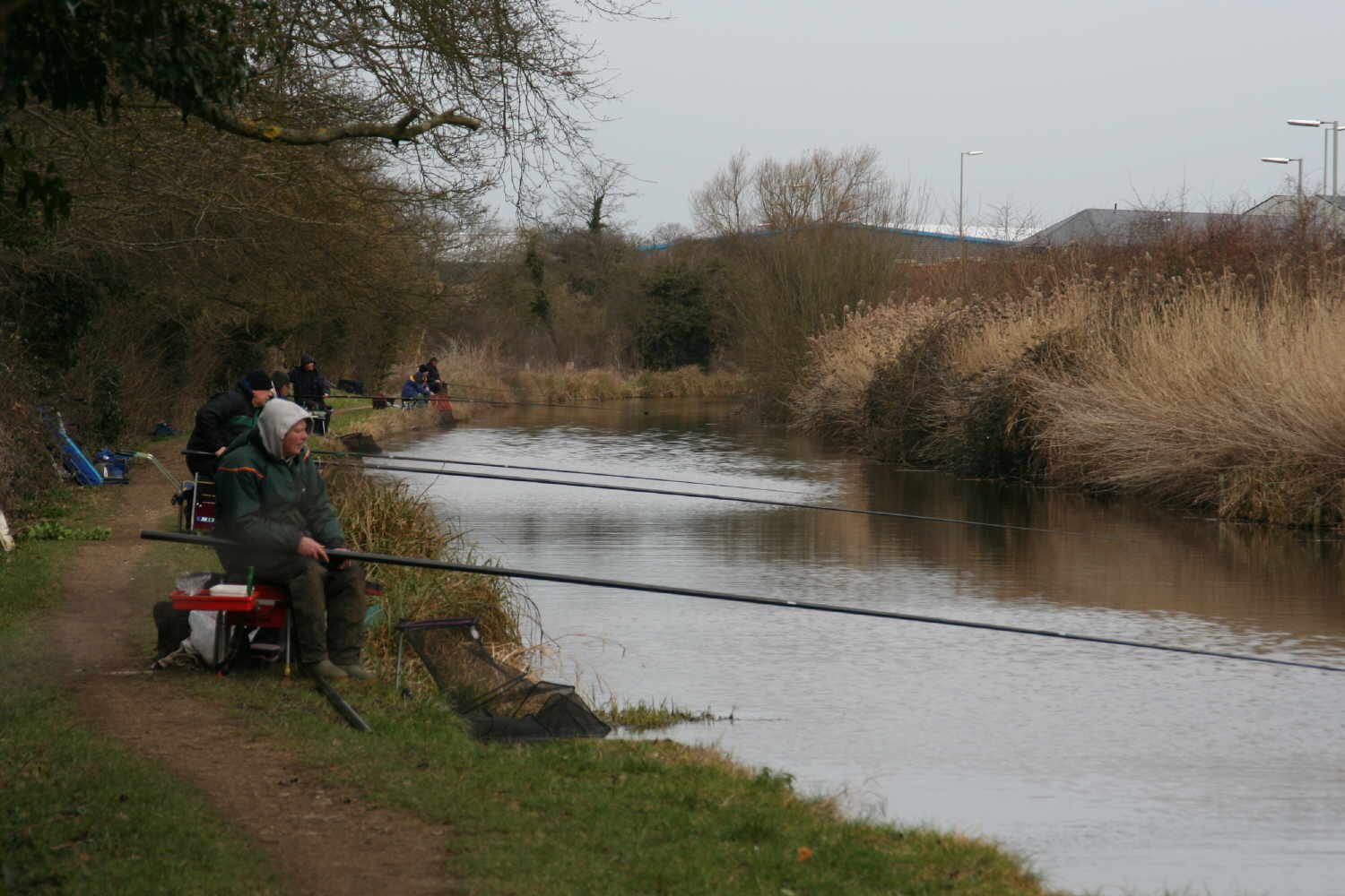 Fischer am Oxford Canal, zwischen Oxford und Banbury